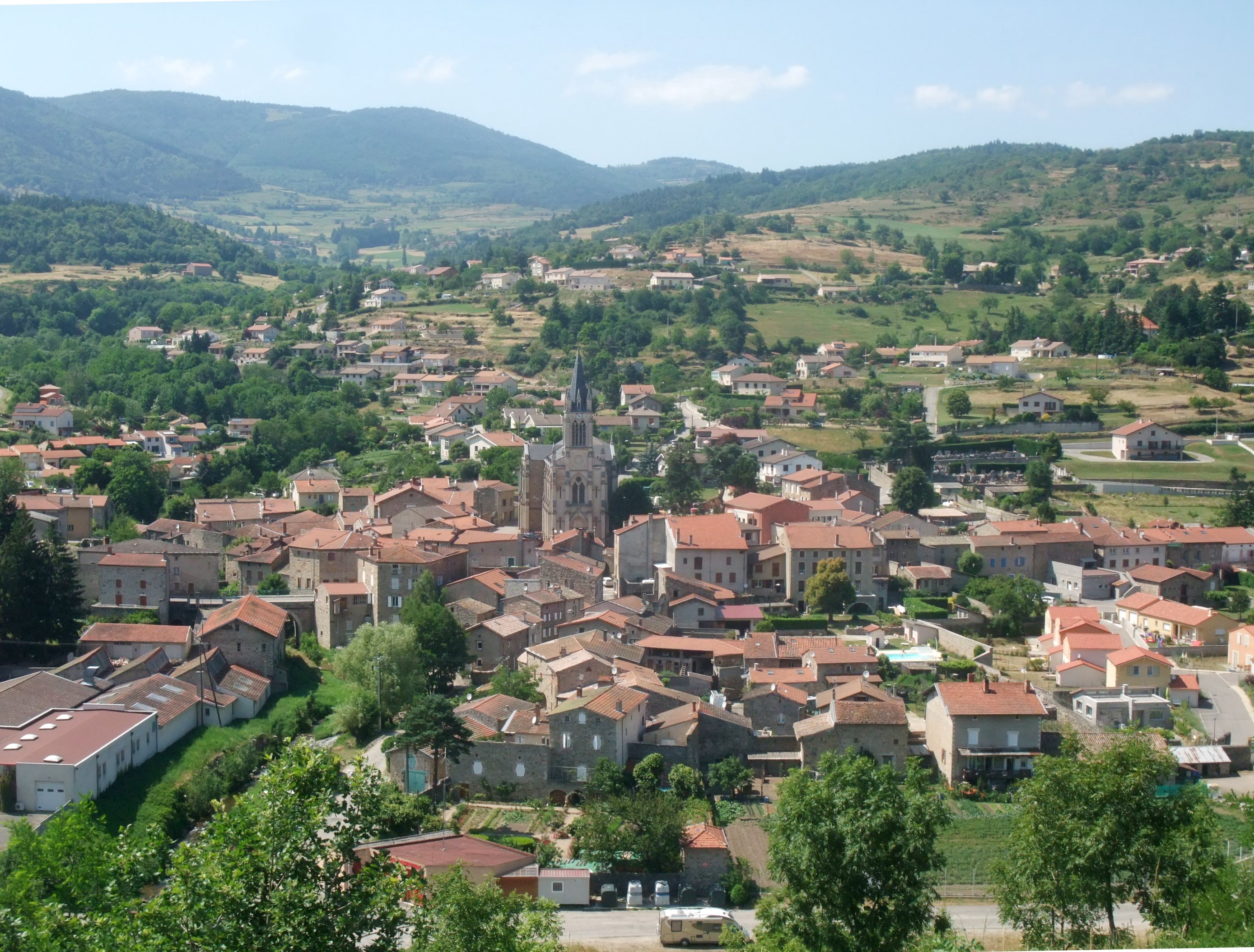 Villevocance vue générale